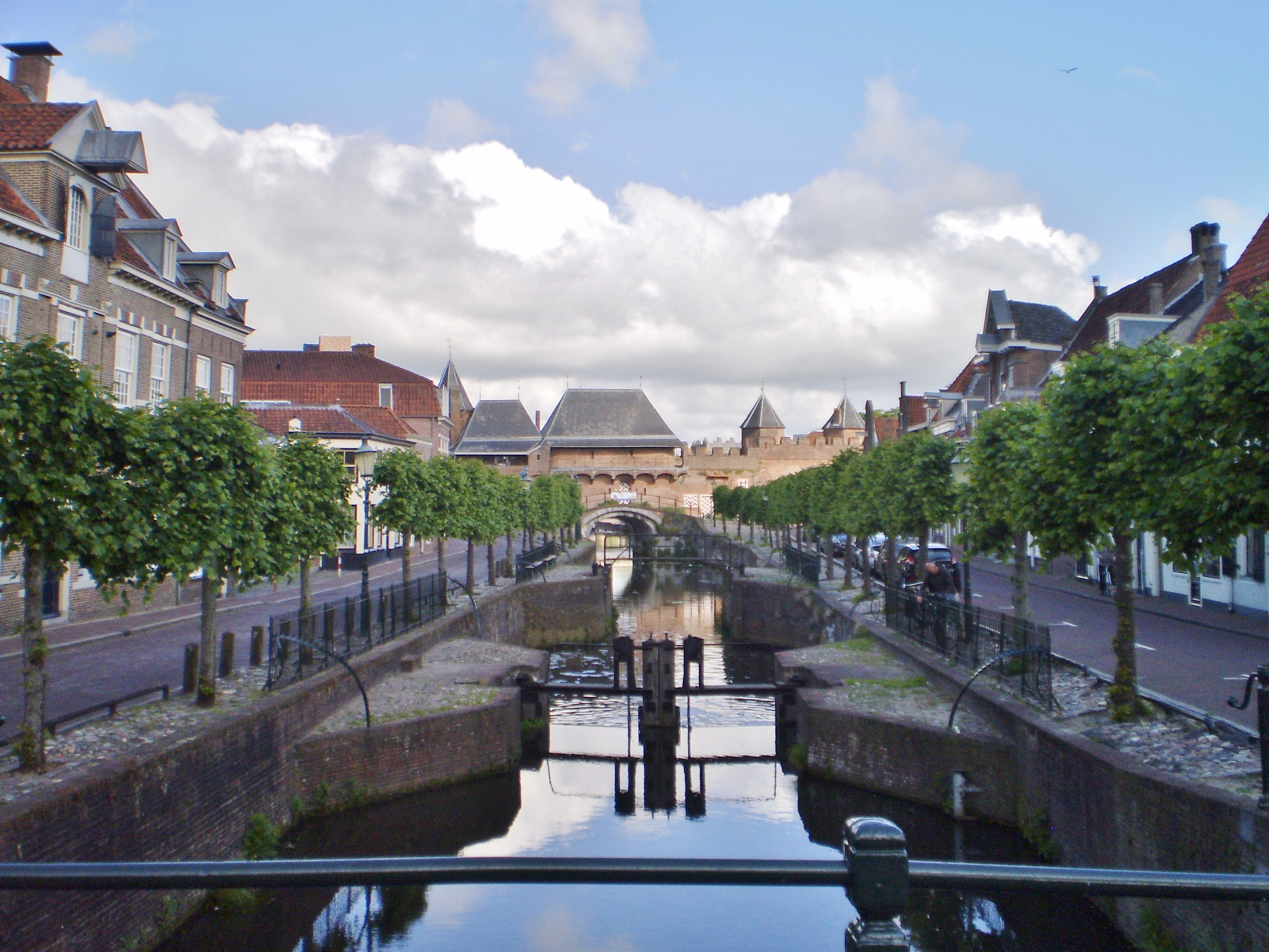 Grote Spui en Kleine Spui, zicht op Koppelpoort